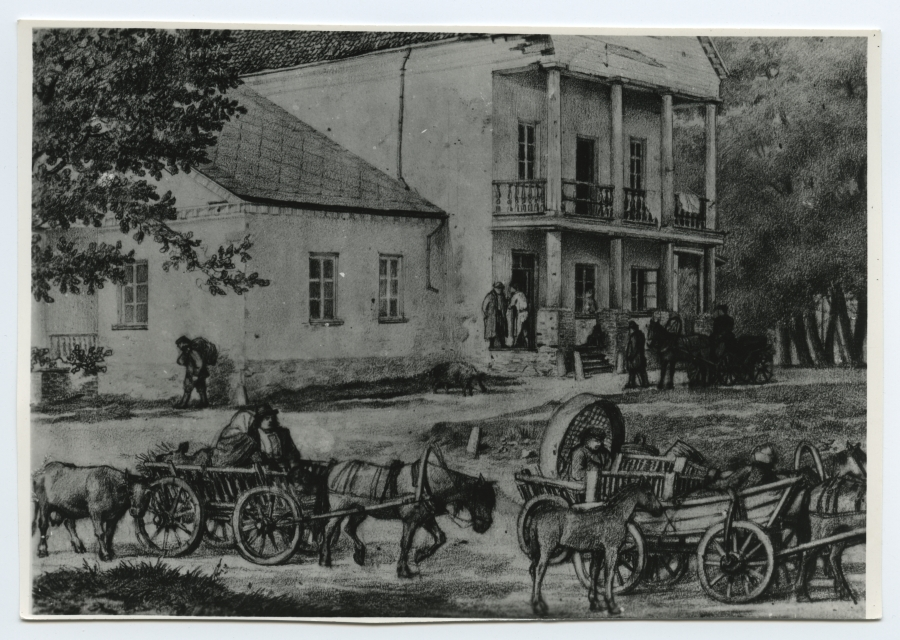 Valge Hobuse kõrts Tartu lähedal